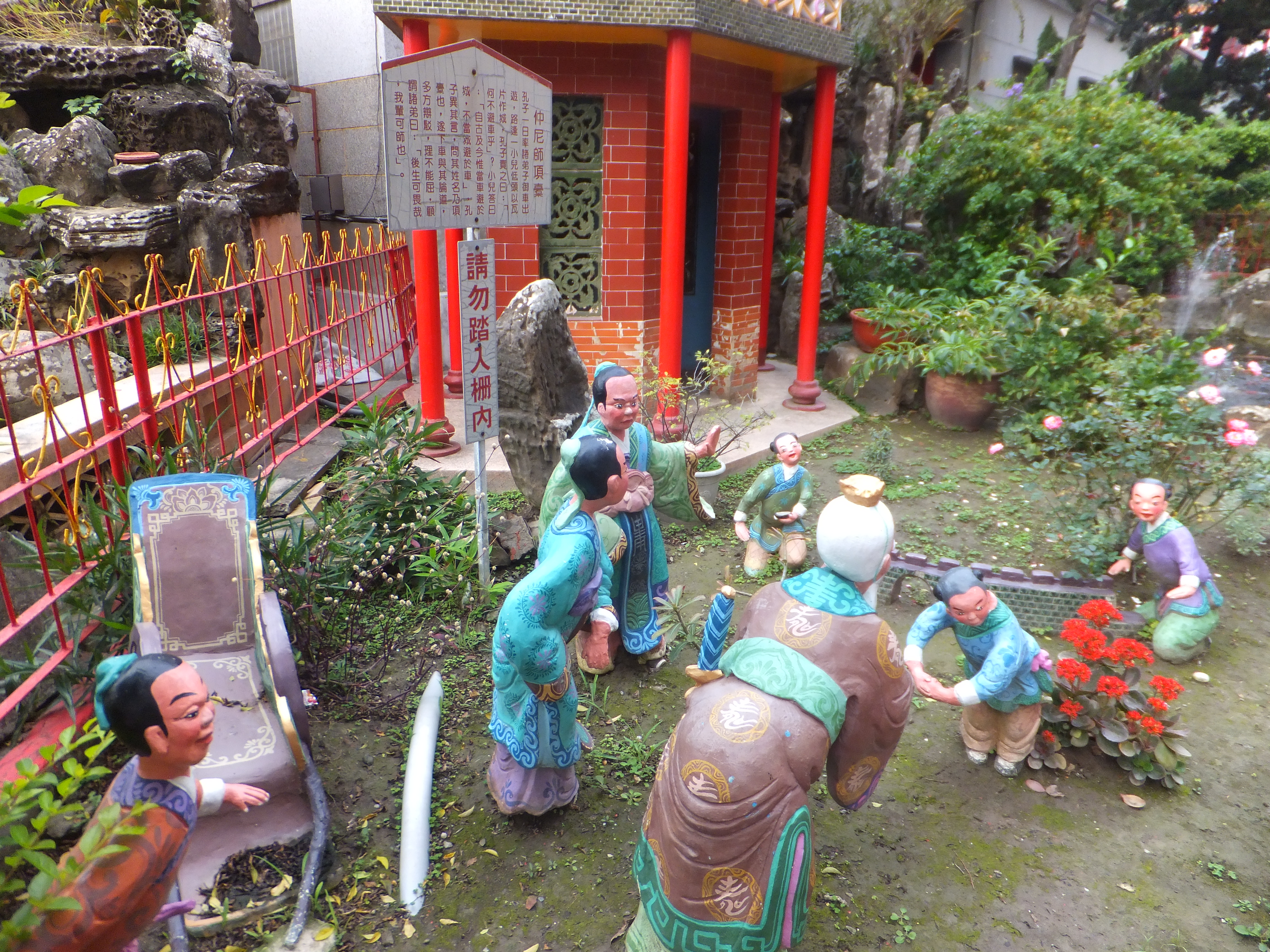 麻豆代天府的仲尼師項橐